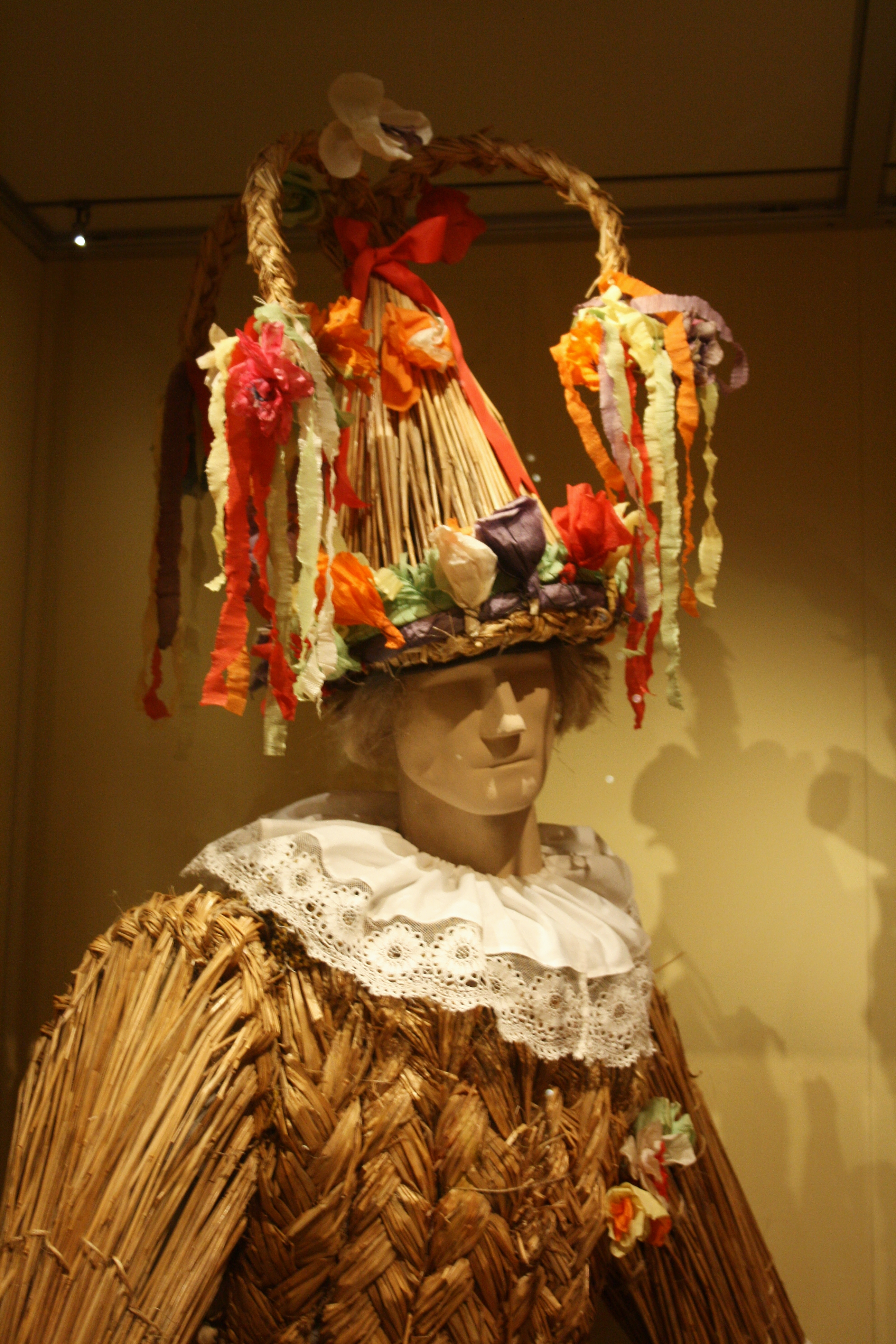 Národopisné muzeum - Musaion: Typická postava masopustní obchůzky na Hlinecku, maska zvaná slaměný (detail). Oblek je vytvořen ze slámy, s textilními doplňky (Východní Čechy, Vortová u Hlinska, 1993)